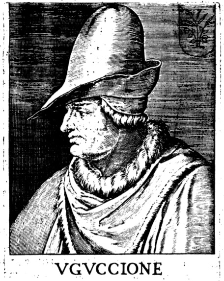 Ritratto del condottiero Uguccione della Faggiola